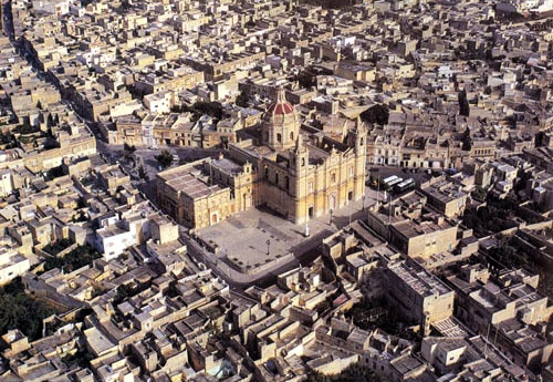 Zejtun City Center